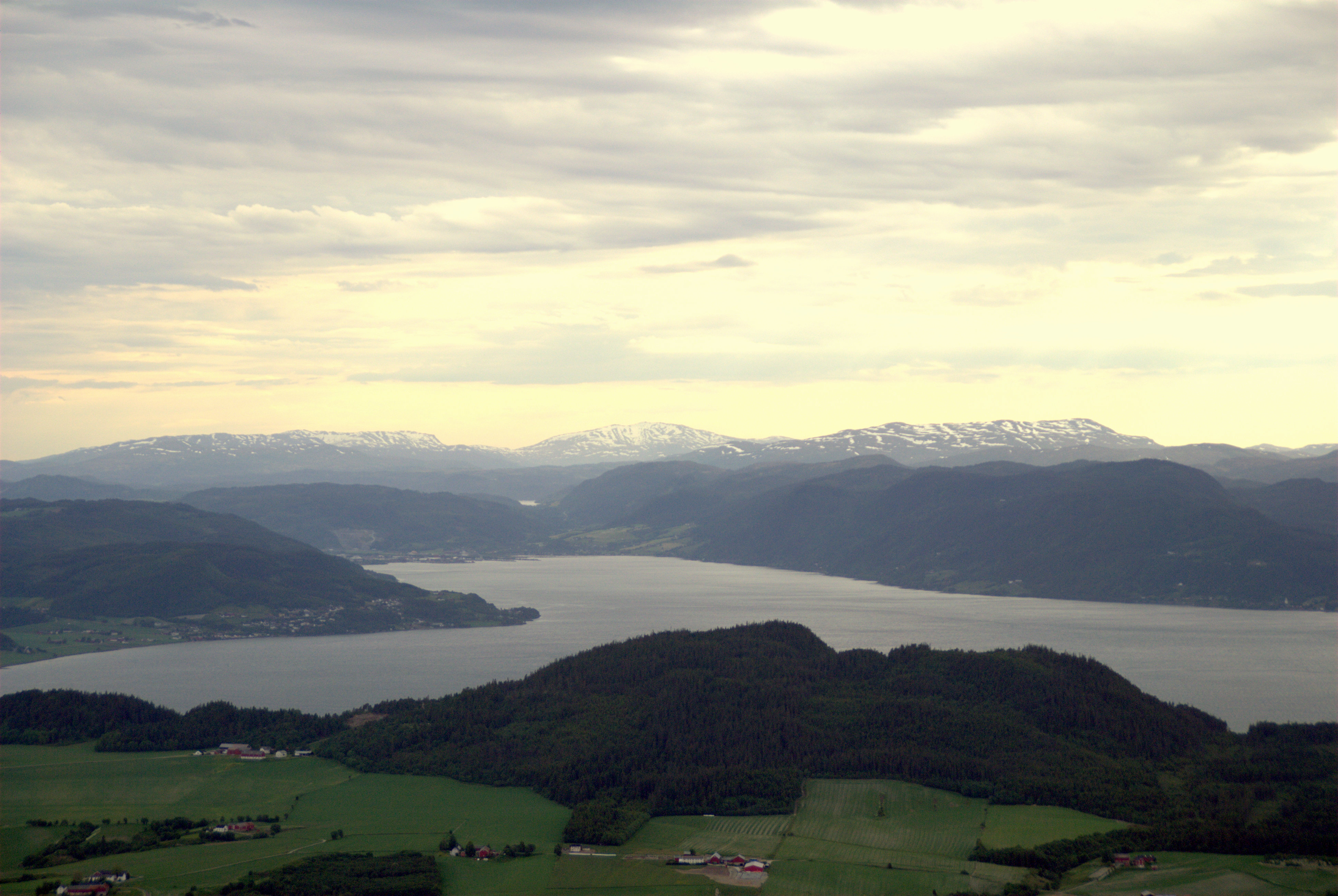 Gaulosen til venstre, Orkdalsfjorden med Orkanger i midten og Korsfjorden til høyre. Bilde tatt fra Storheia i Bymarka i Trondheim.